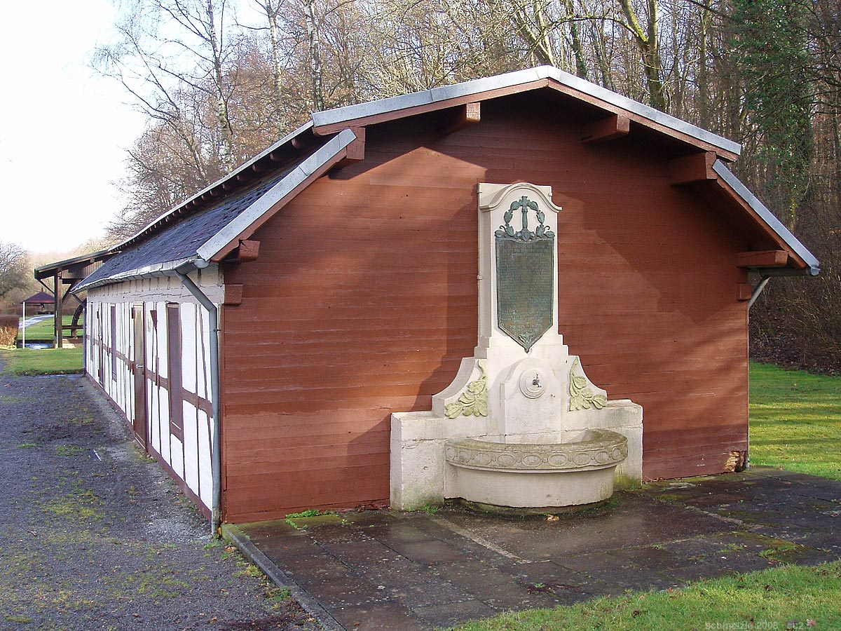 Pumpenhäuschen der Saline in Bad Rappenau mit Kriegerdenkmal für die gefallenen Salinenarbeiter 1914-18